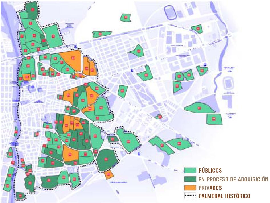 Mapa de los Huertos de palmeras de la ciudad de Elche (España)